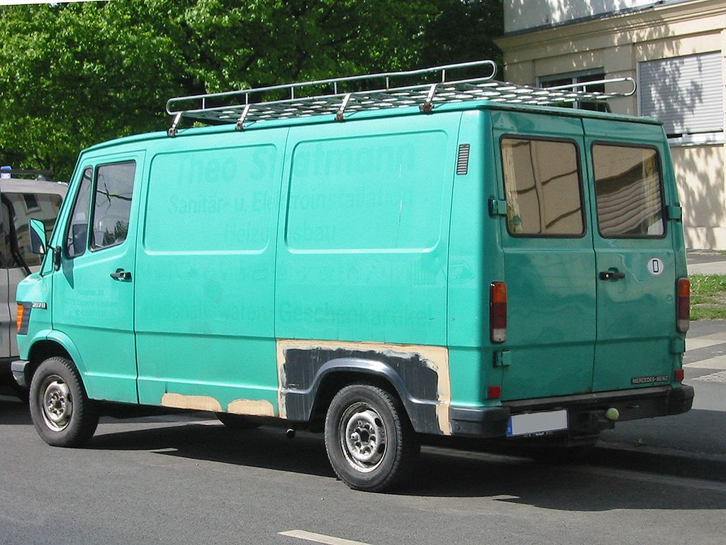 Mercedes T 1